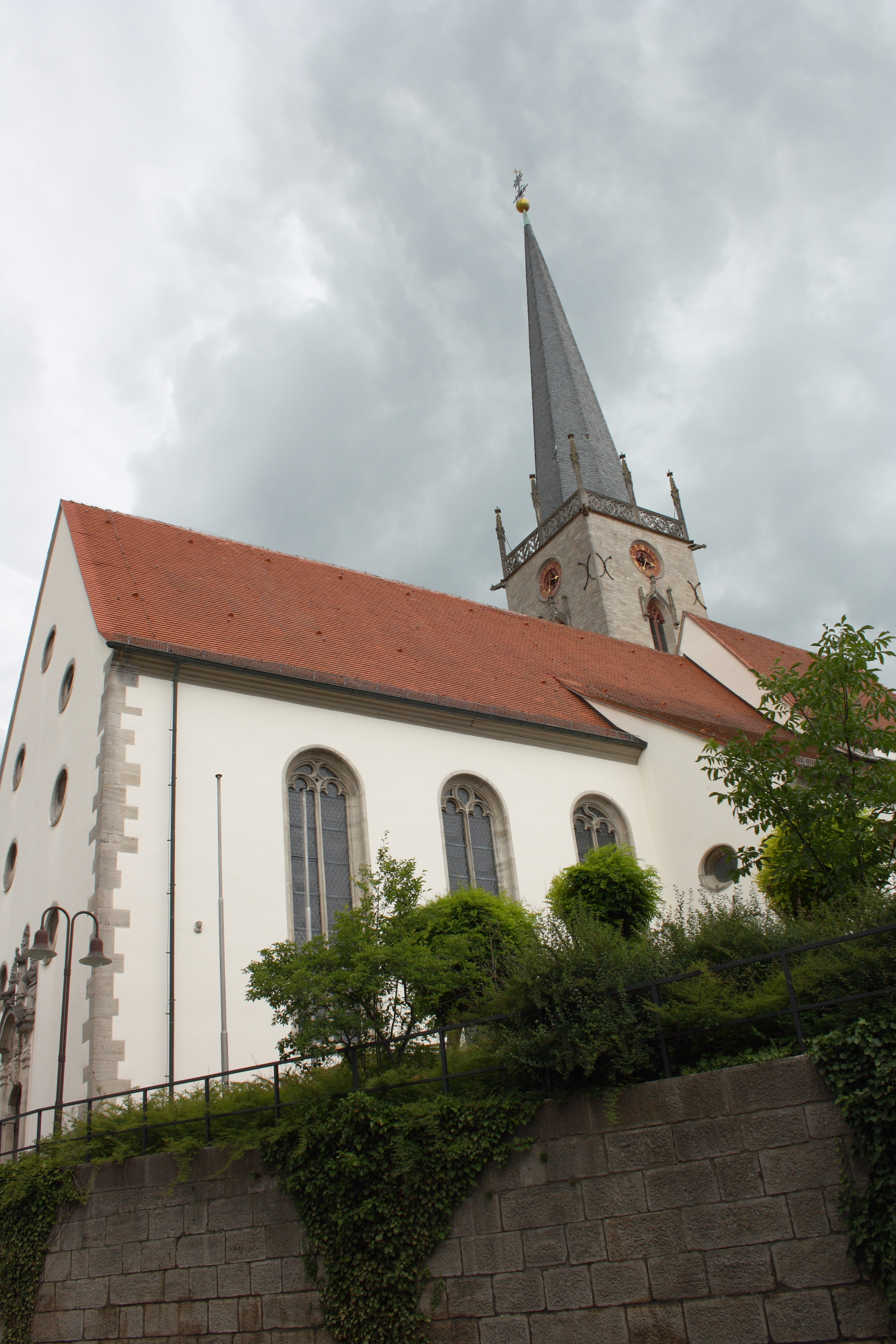 katholische Stadtpfarrkirche St. Peter und Paul in Grünsfeld im Main-Tauber-Kreis (Baden-Württemberg), Hauptstraße 18